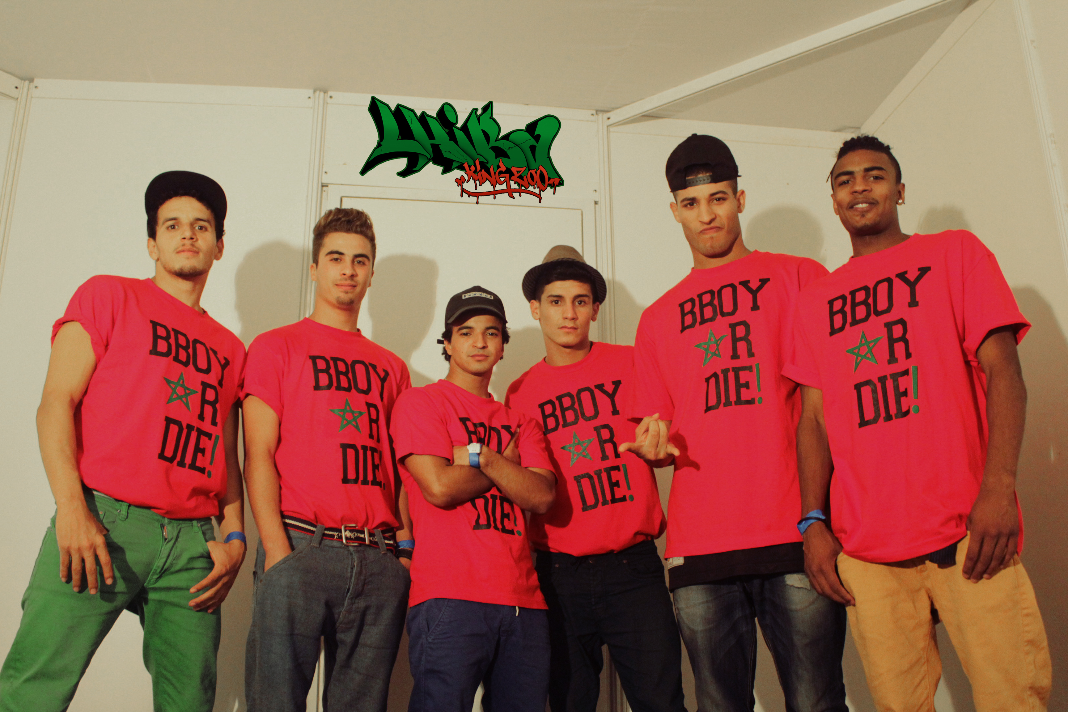 Lhiba Kingzoo, groupe de Break dance marocain